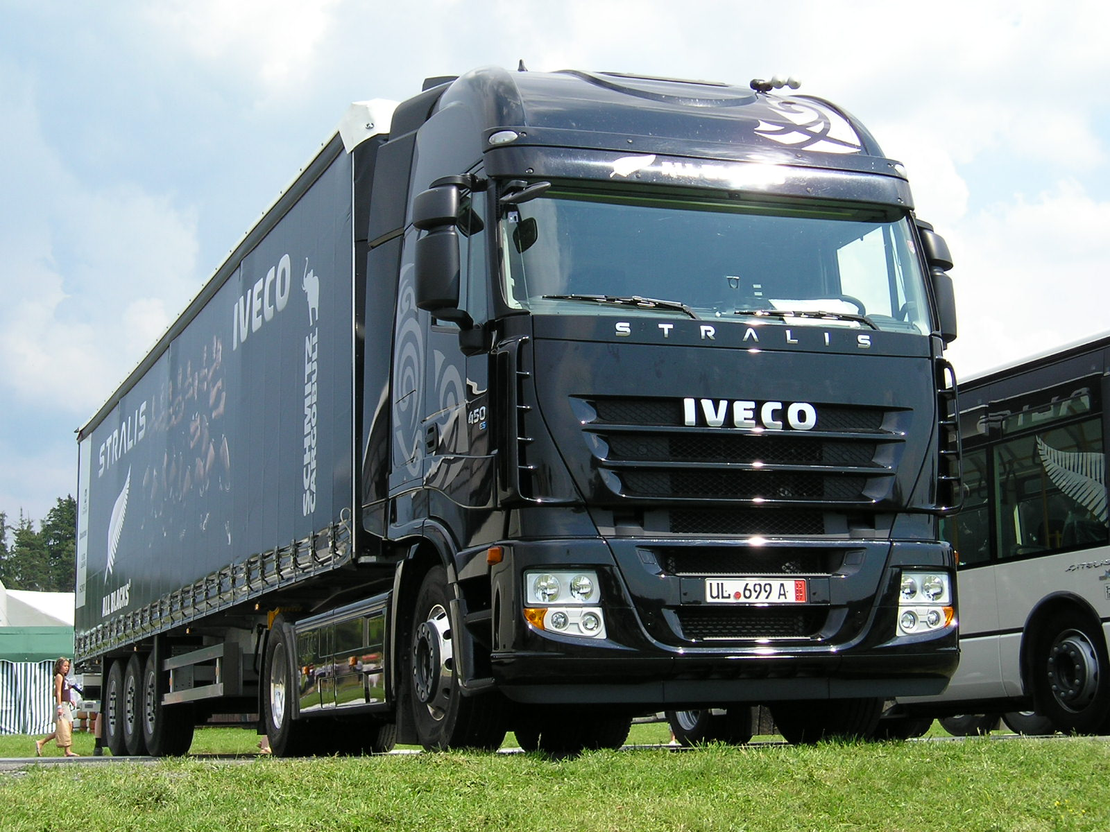 Iveco Stralis All Blacks na předváděcí akci na autodromu ve Vysokém Mýtě